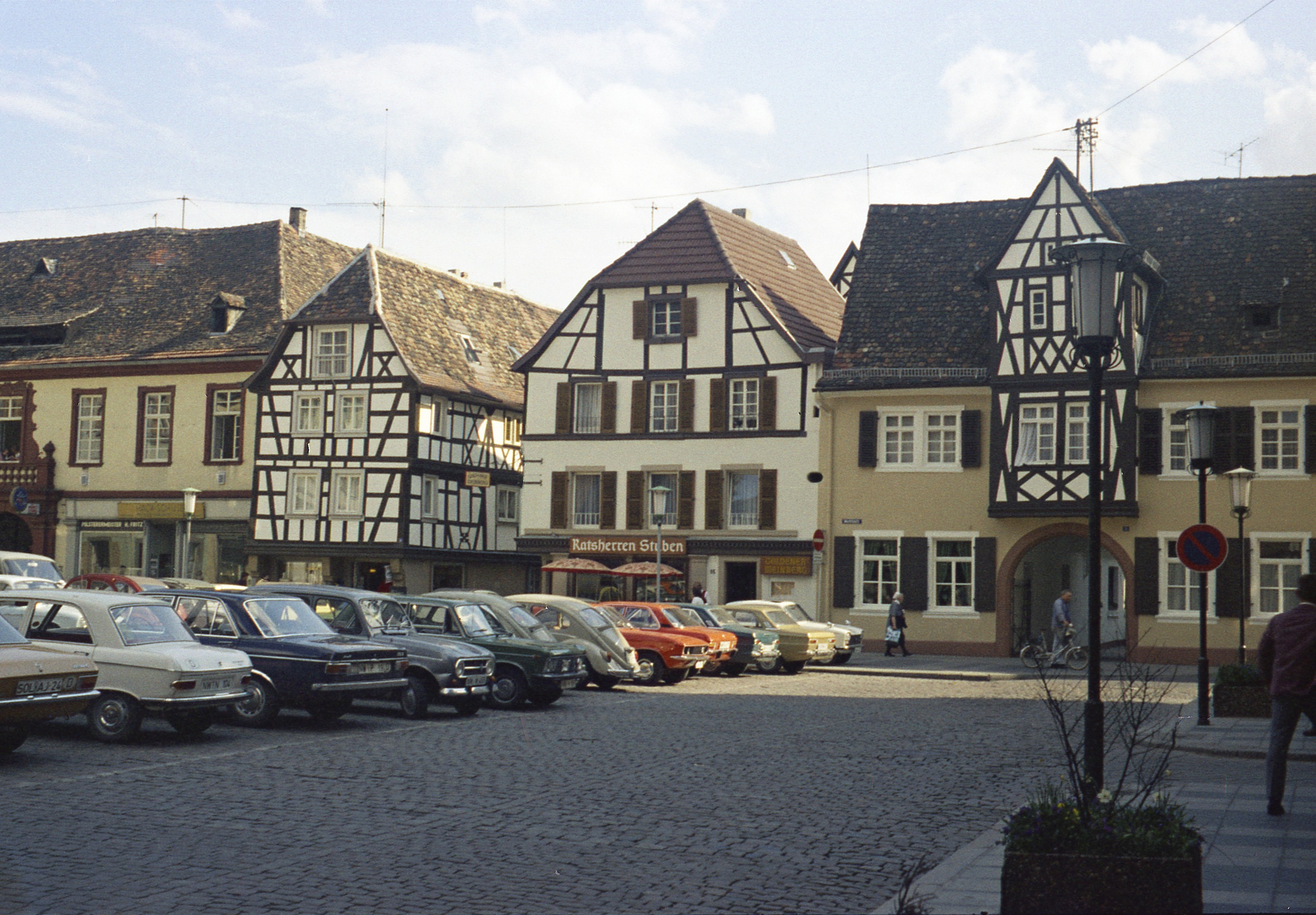 Neustadt an der Weinstraße (Innenstadt)